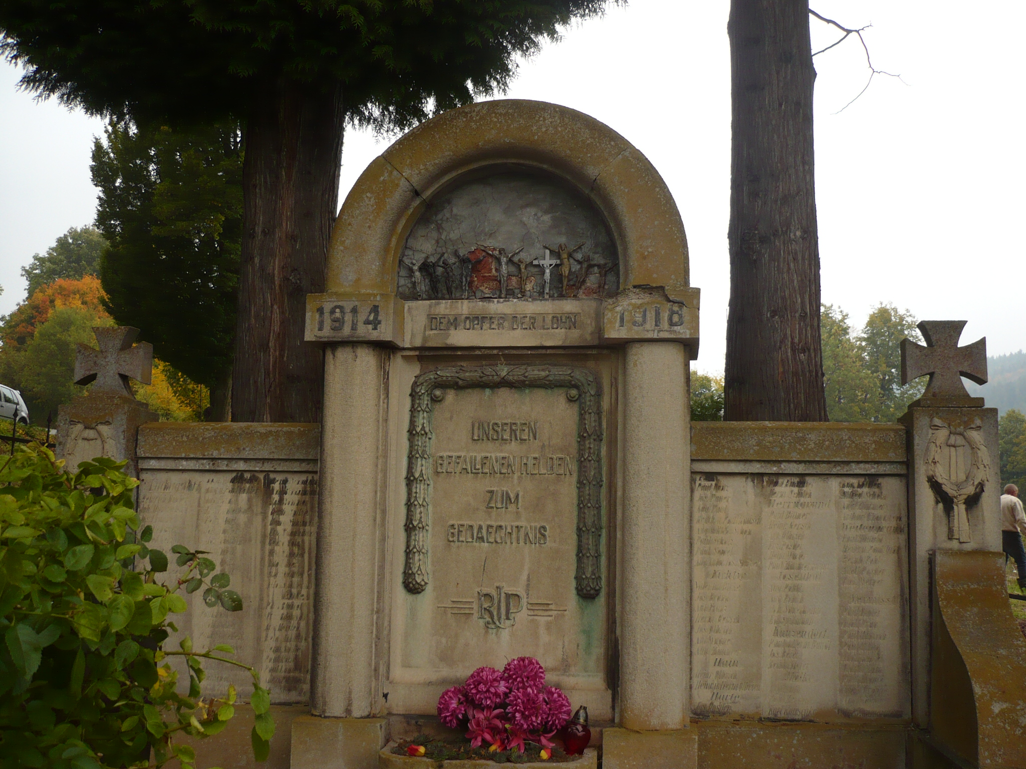 Ludwikowice Kłodzkie. Pomnik ofiar I wojny światowej